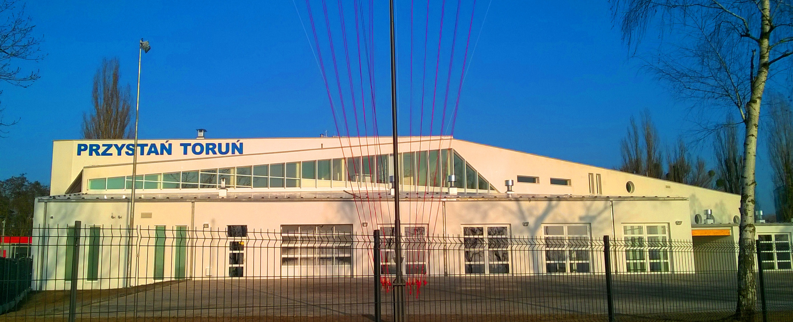 Przystań AZS w Toruniu55